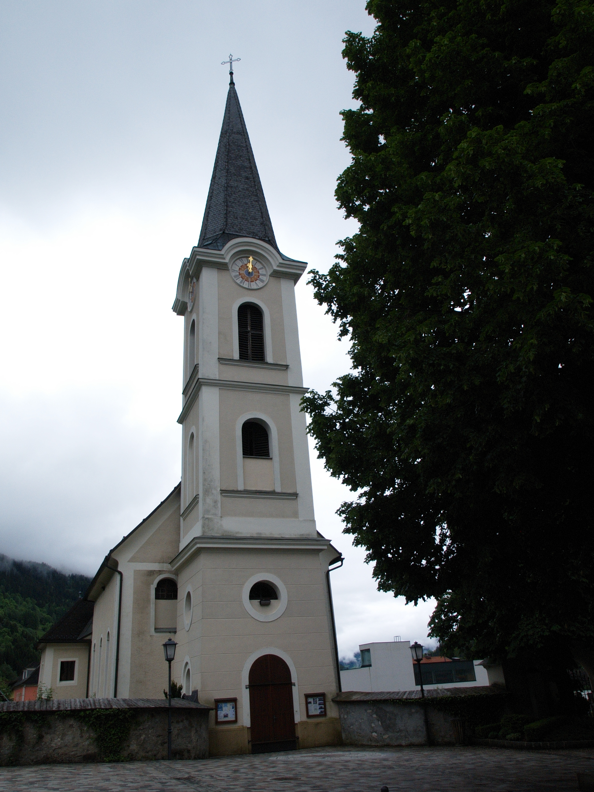 Kirche Feld am See